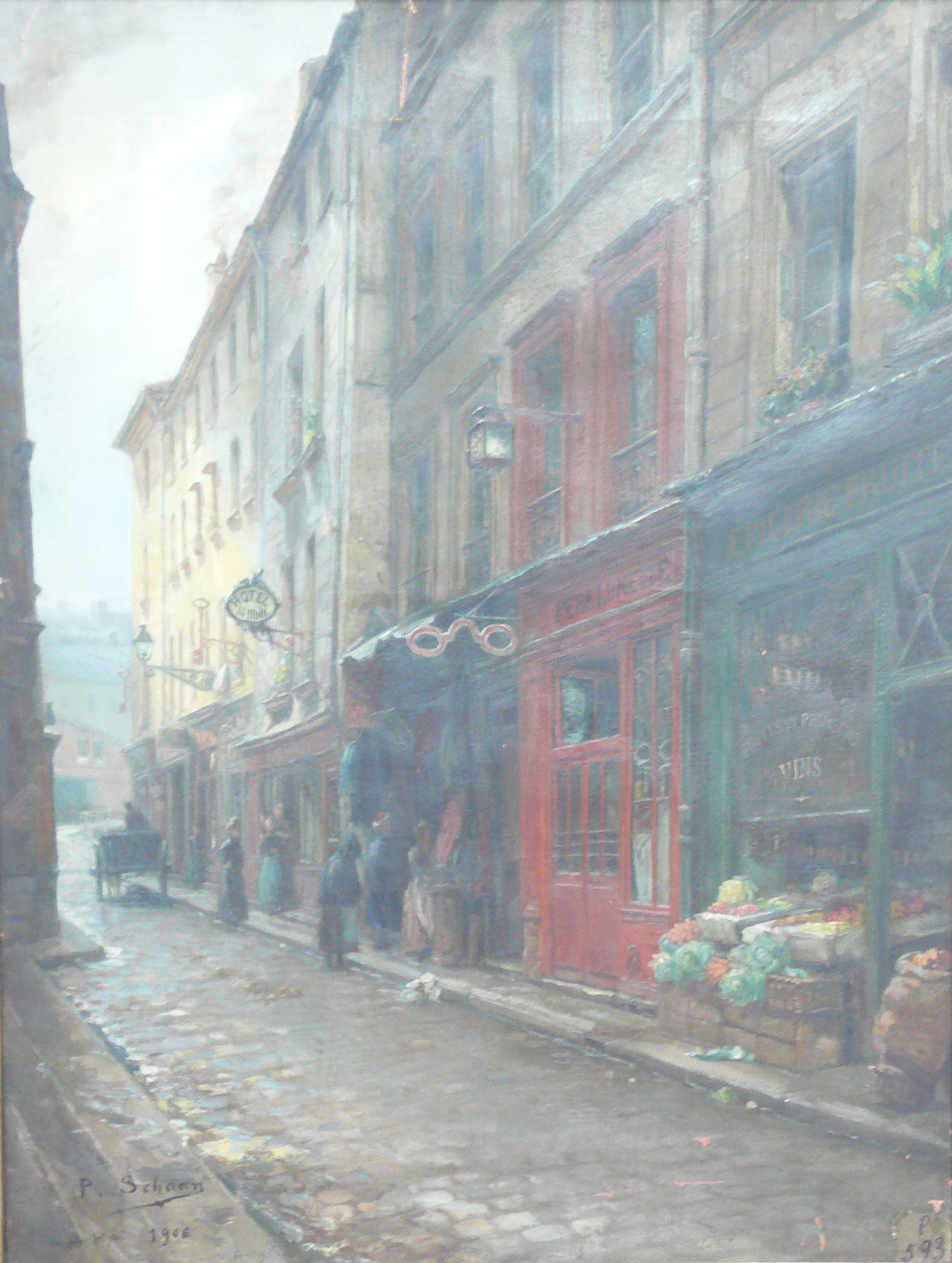 Le cabaret du Père Lunette en 1906